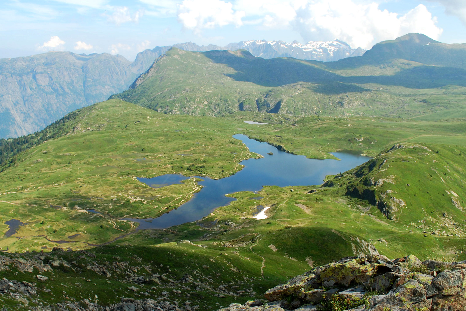 Vue du Lac Fourchu depuis la montée au Taillefer